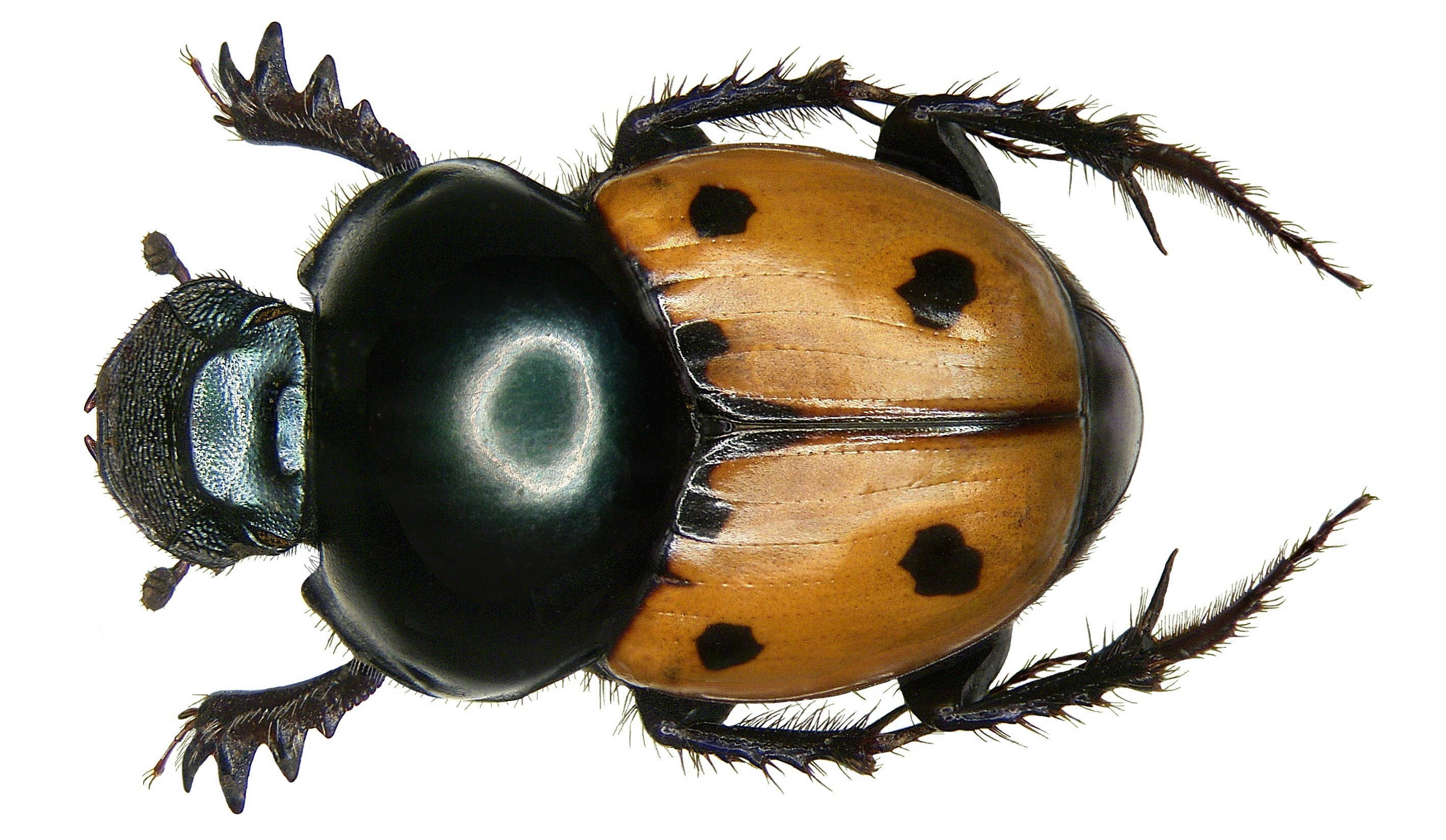 Familie: Scarabaeidae Größe: 13,5 mm Verbreitung: Madagascar Fundort: Madagascar, Sacaraha, 1966 det. H.P.Marx Foto: U.Schmidt, 2008